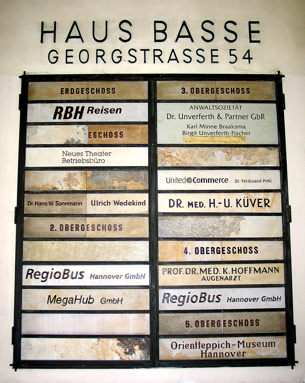 Vor den Zugängen im Haus Basse in der Georgstraße 54 findet sich im Durchgang eine große Tafel mit Fliesen, auf denen auf die Mieter und Nutzer in den jeweiligen Geschossen des Gebäudes hingewiesen wird, darunter ein "Orientteppich-Museum Hannover" ...